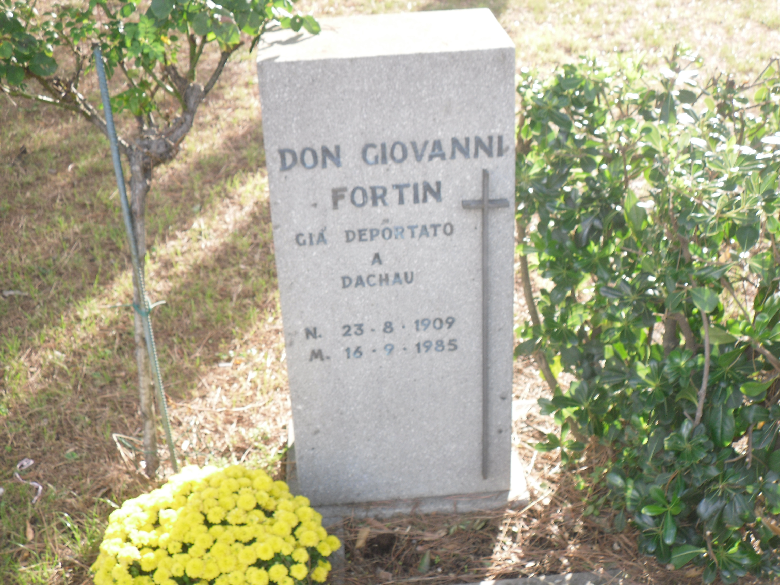 Tempio nazionale dell'internato ignoto di Padova. Cippo in memoria di don Giovanni Fortin.